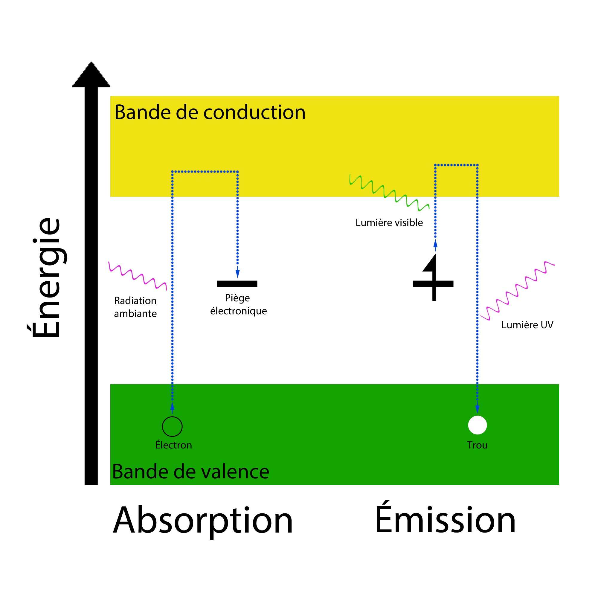 Ce schéma explique les transitions des électrons à la base du phénomène de la luminescence optiquement stimulée.